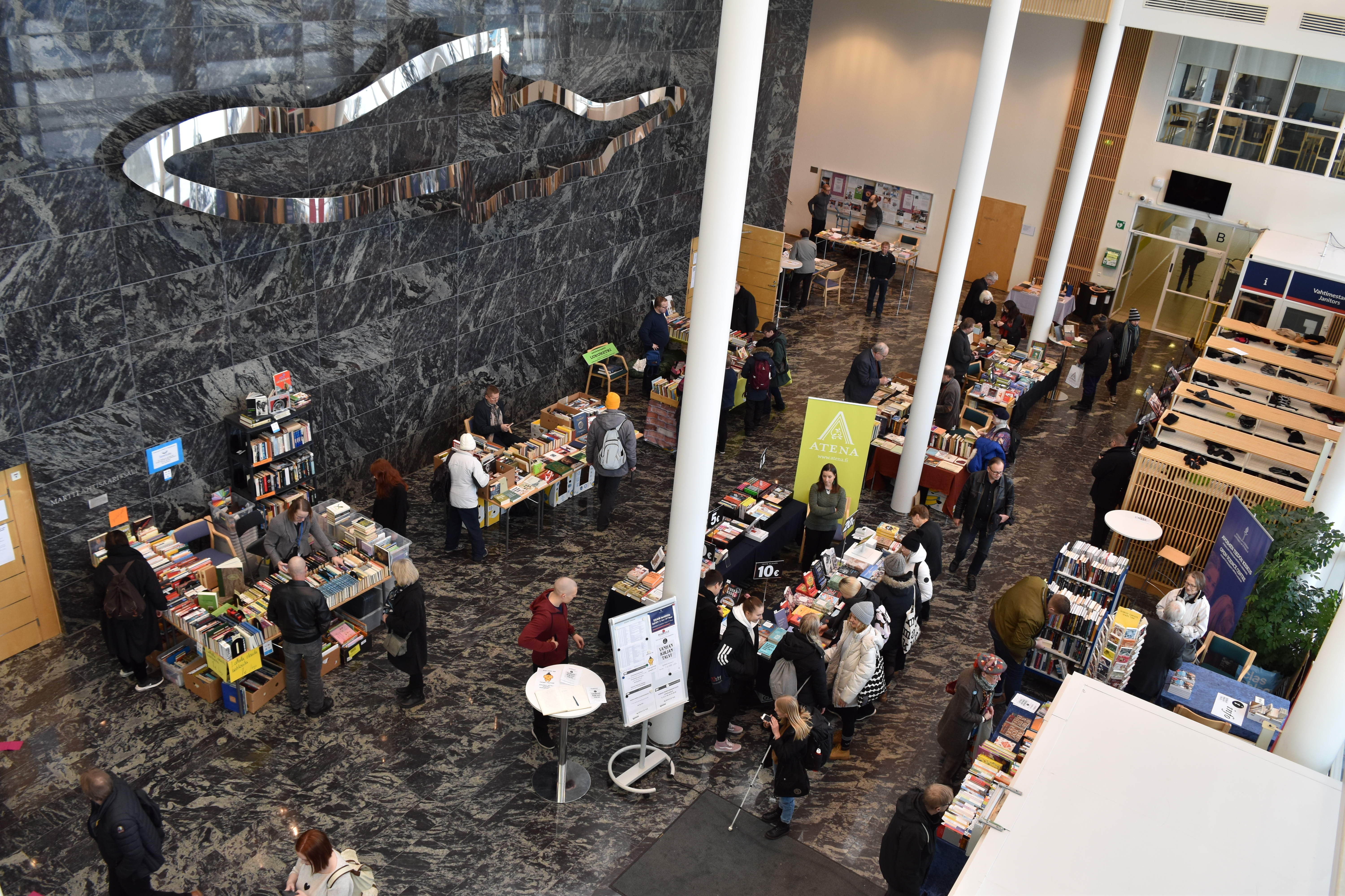 Vanhan Kirjan Talvi 2020 tapahtuma Jyväskylässä.